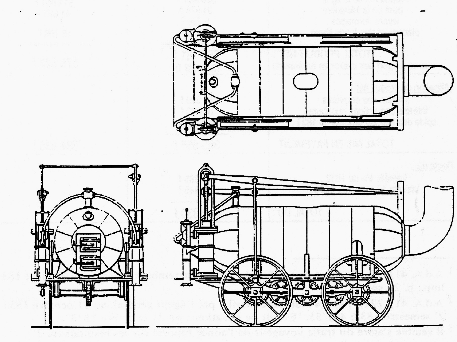 Projet (~1820) de locomotive attribué à William Hedley (non réalisé).